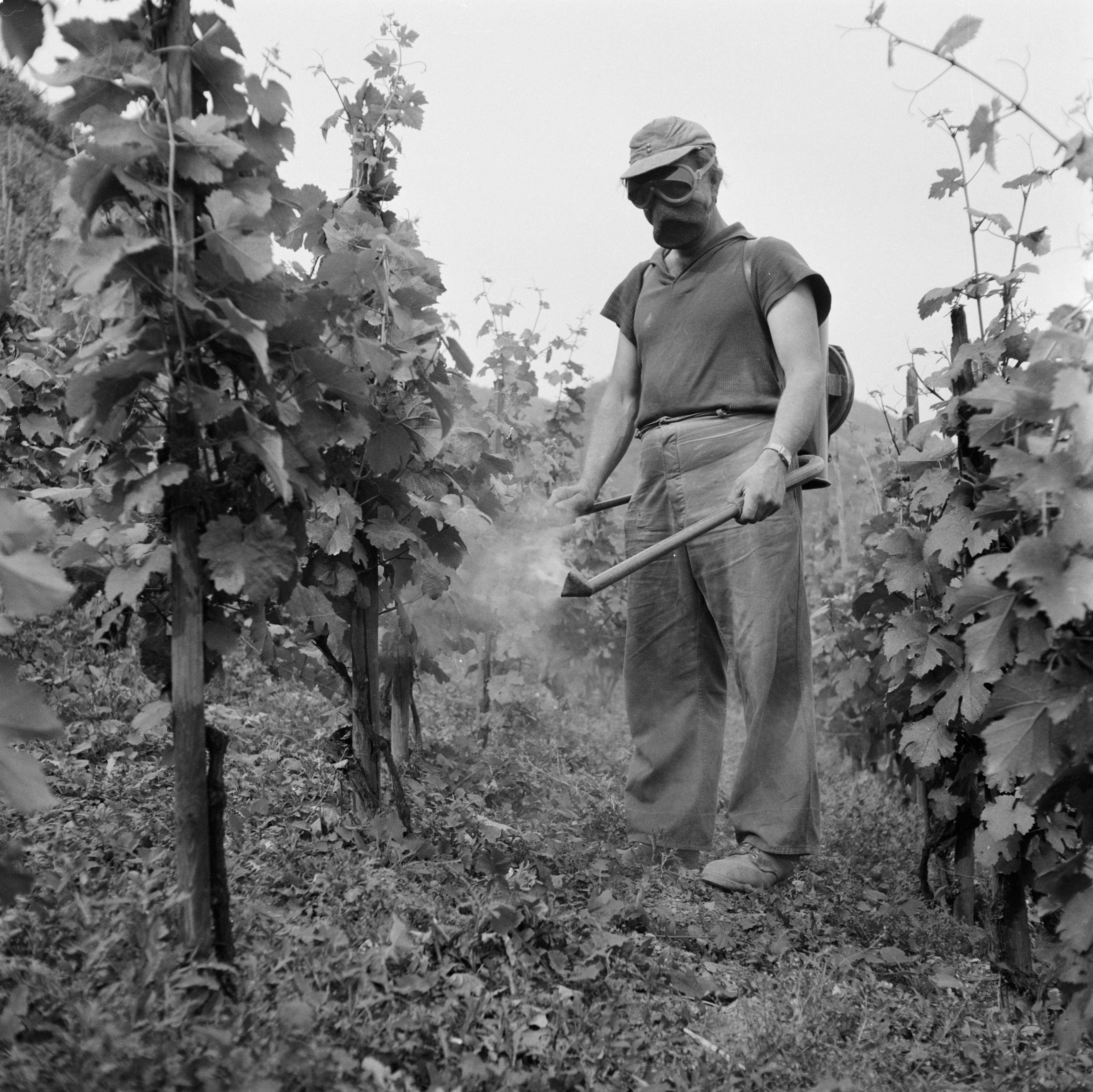 Collectie / Archief : Fotocollectie Van de Poll Reportage / Serie : Rijnvaart, reportage vanaf sleepboot Damco 9: West-Duitsland Beschrijving : Bespuiten van de wijnranken tegen schimmelziekten en insektenplagen Datum : 1 april 1955 Locatie : Bad Salzig, Duitsland, West-Duitsland Trefwoorden : arbeiders, bestrijdingsmiddelen, wijnbouw Fotograaf : Poll, Willem van de Auteursrechthebbende : Nationaal Archief Materiaalsoort : Negatief (6x6) Nummer archiefinventaris : bekijk toegang 2.24.14.02 Bestanddeelnummer : 254-1170